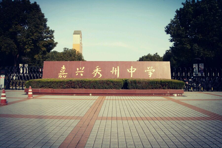 中文（中国大陆）: 秀州中学正门